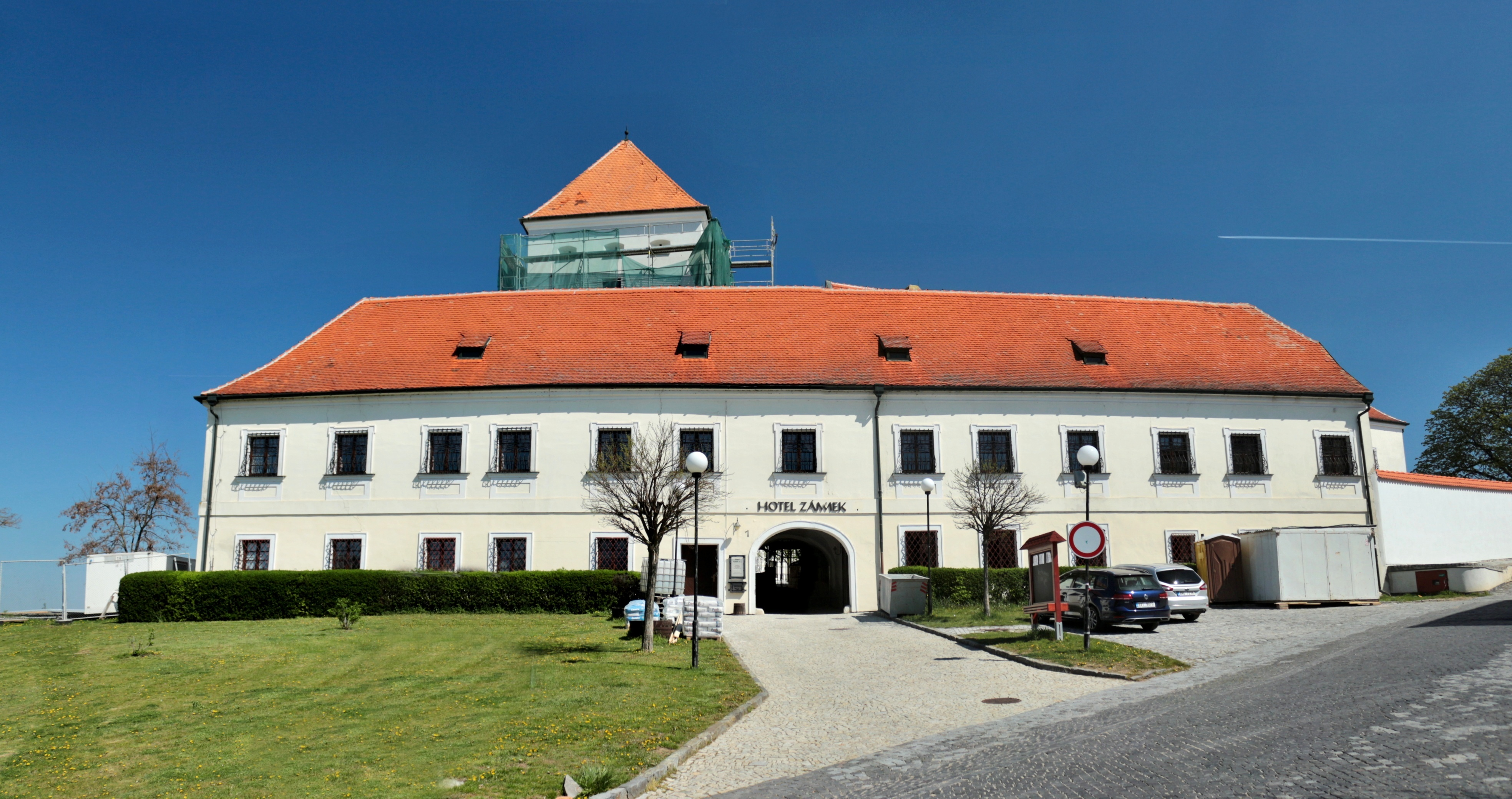 Čejkovice zámek